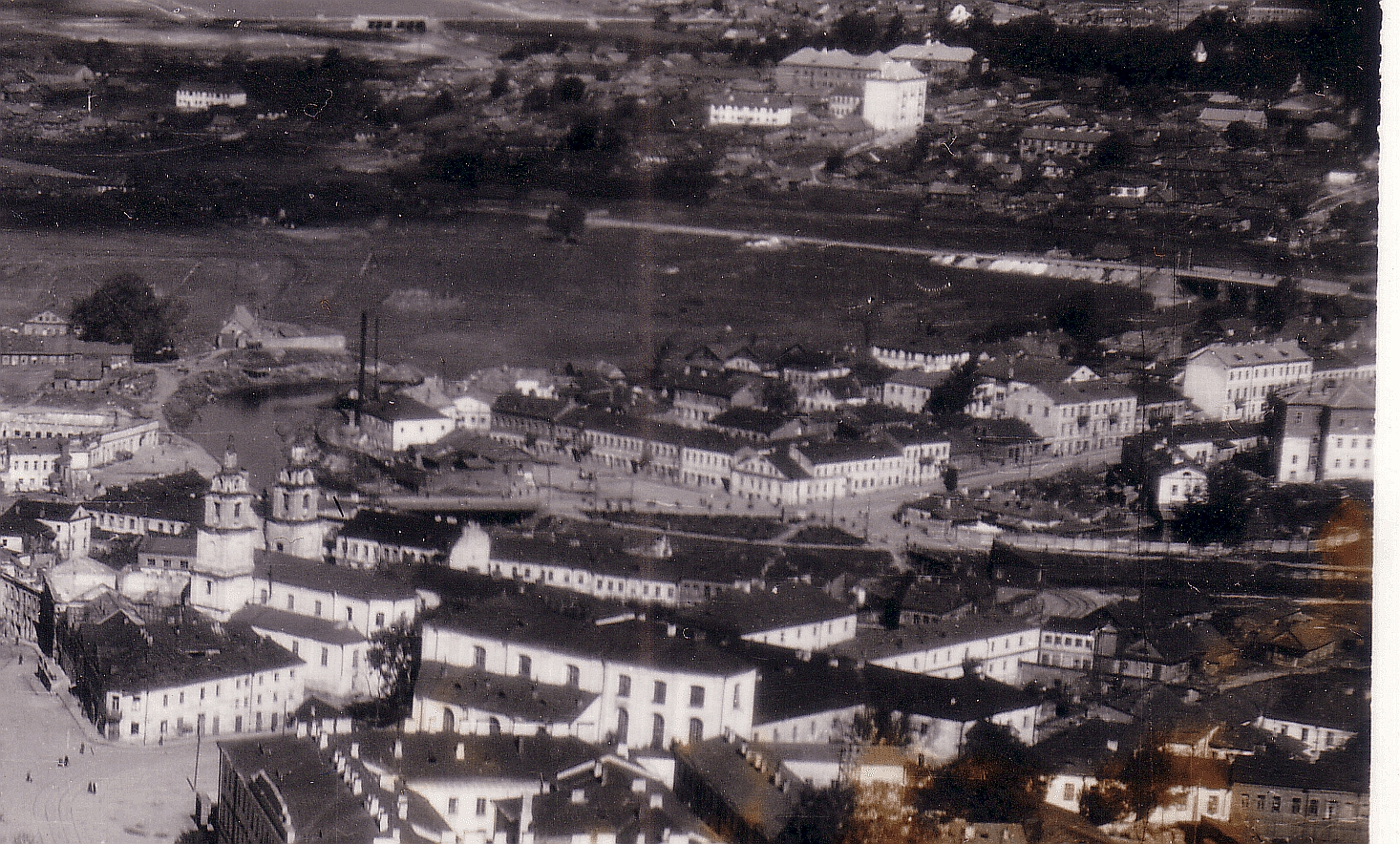 Беларуская (тарашкевіца): Менск (Miensk), Высокае Места (Vysokaje Miesta). Аэрафотаздымак